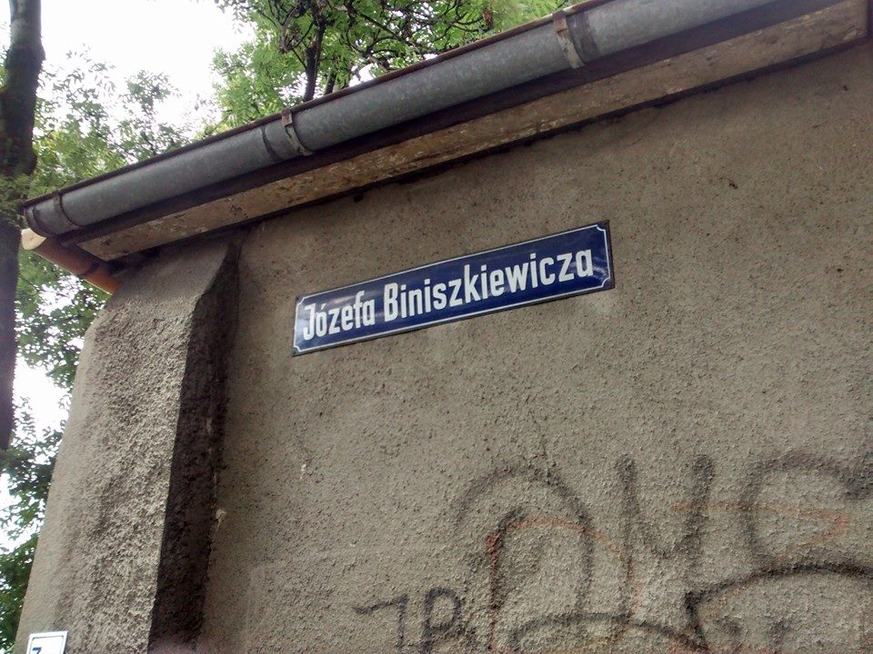 Katowice - ul. J. Biniszkiewicza w dzielnicy Dąbrówka Mała - tabliczka